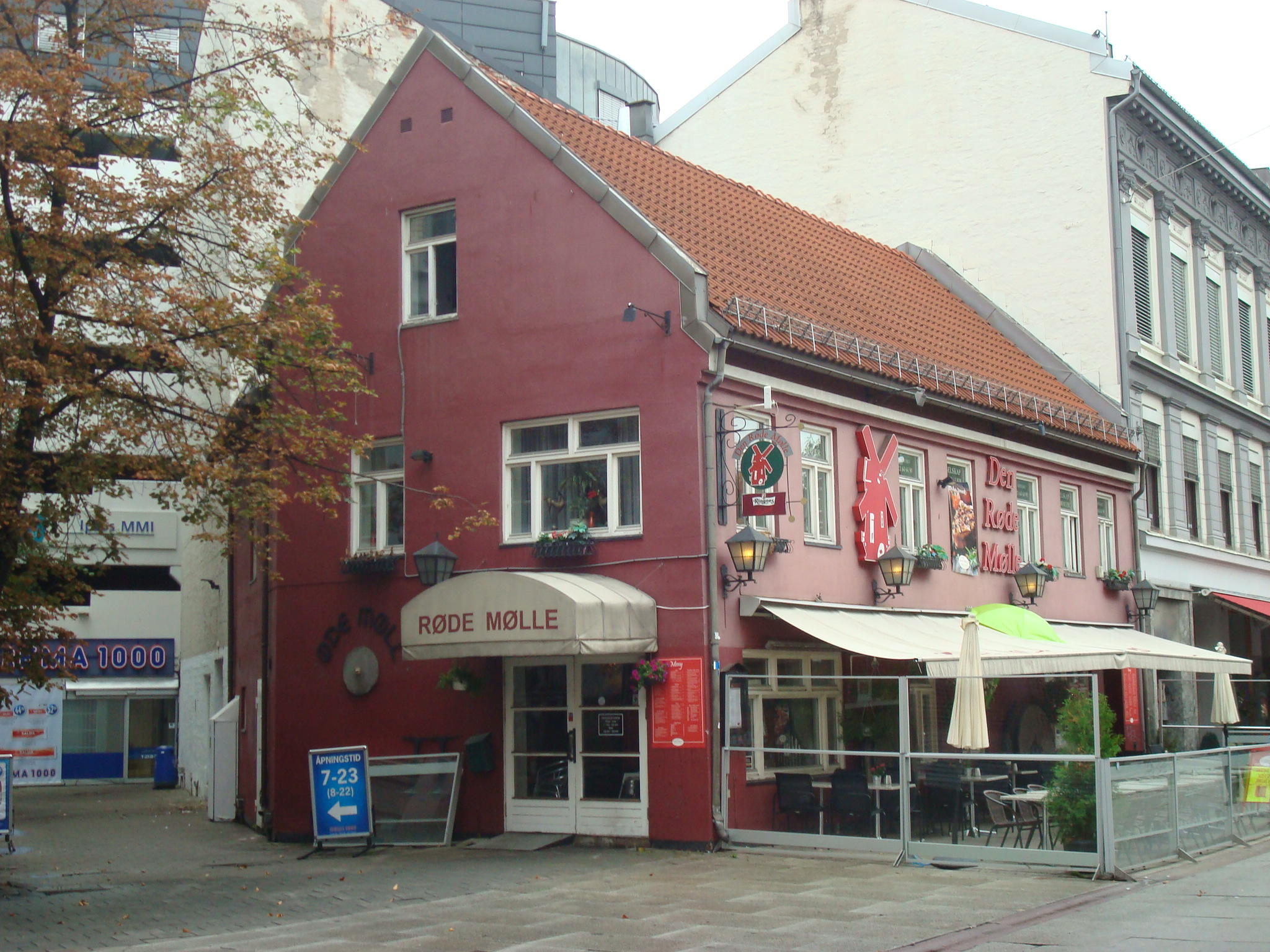 Den røde mølle, Brugata 9 i Oslo